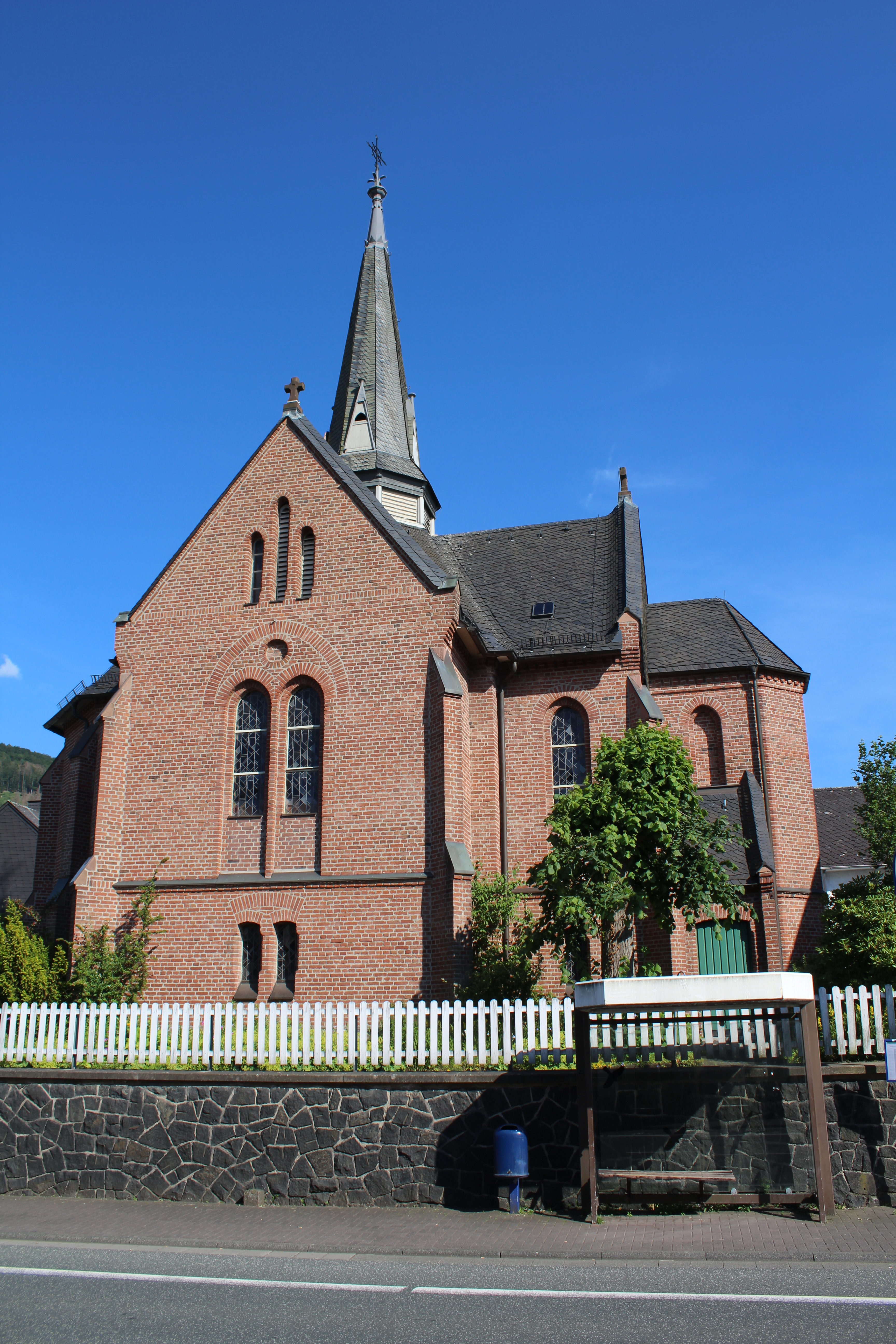 Ev. Kirche Wissenbach, Gemeinde Eschenburg, Hessen, Deutschland